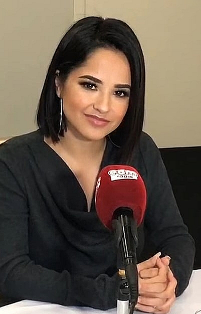 Entrevistamos en una mesa redonda a Becky G. en la que nos habla de su trayectoria y del éxito de su canción "Mayores"